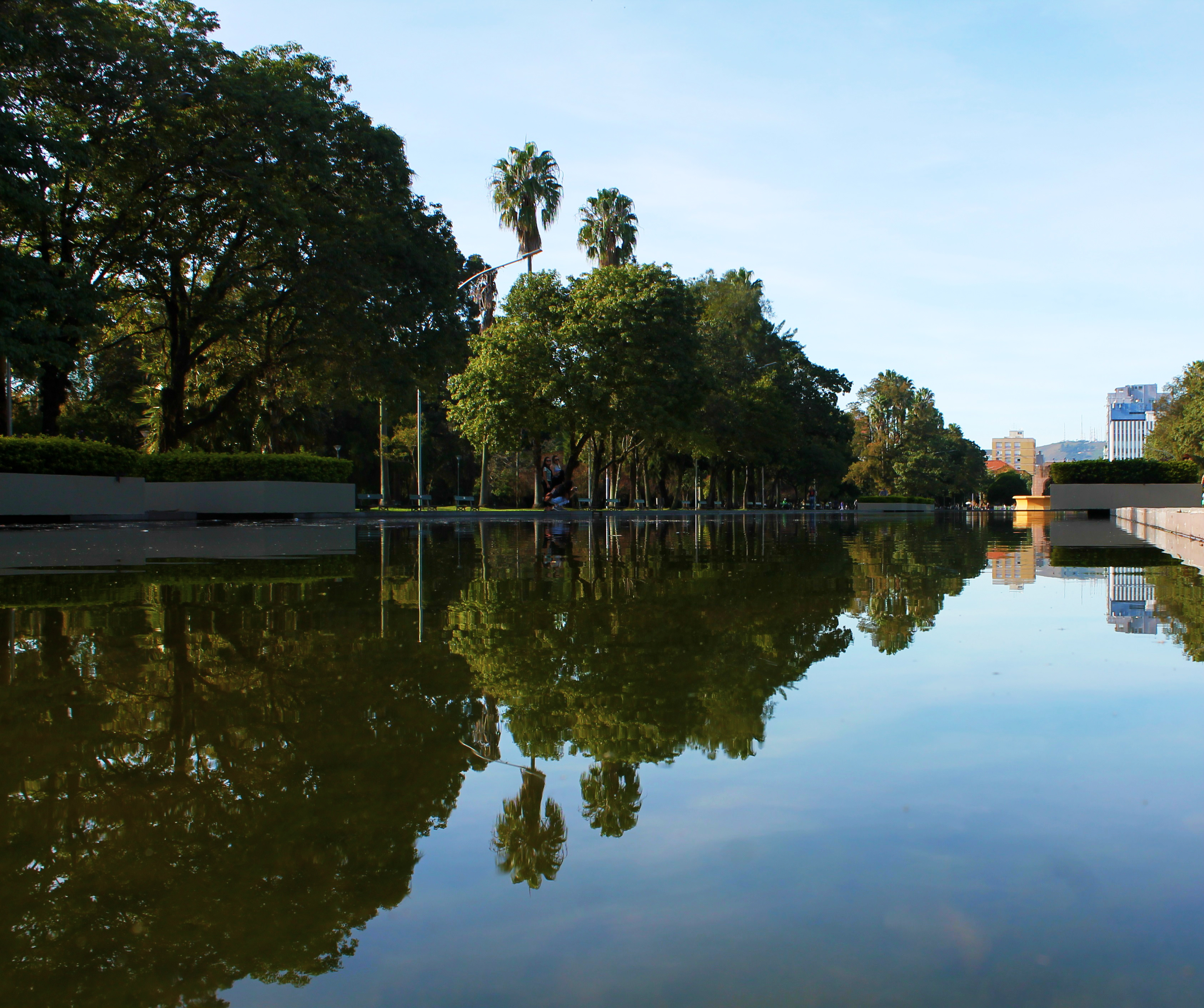 Foto do espelho dágua no Parque Farroupilha em Porto Alegre. A água reflete o céu e as árvores.